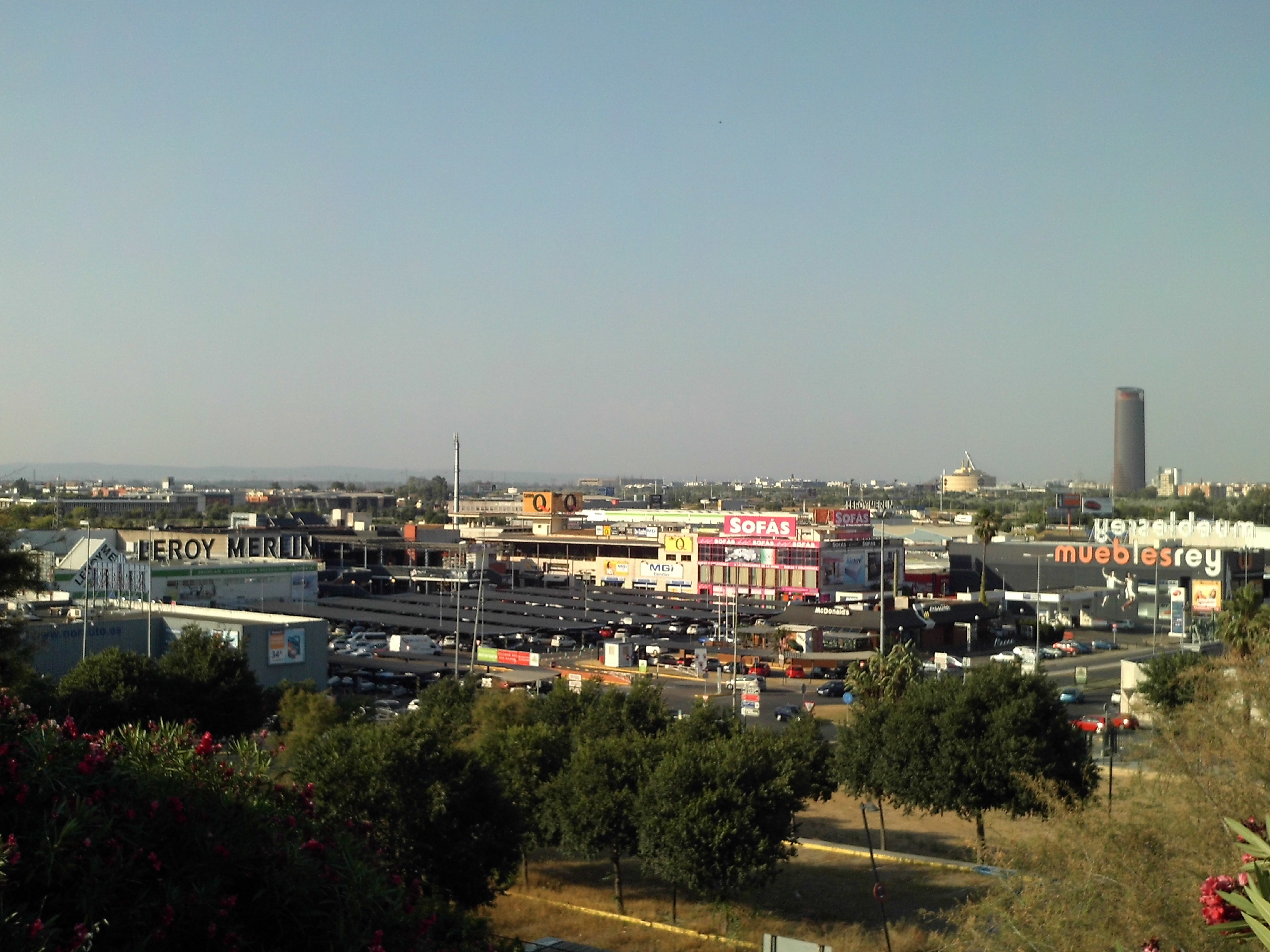 Polígono del Manchón. Tomares, provincia de Sevilla, Andalucía, España.